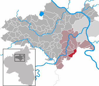 Nörtershausen in Rhineland-Palatinate - district Mayen-Koblenz